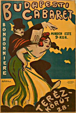 Bonbonniere